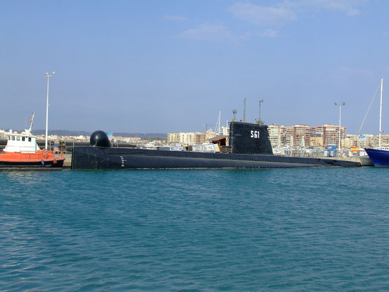 El submarino Delfín (S 61) de la Clase Delfín atracado en el puerto de Torrevieja, Alicante.